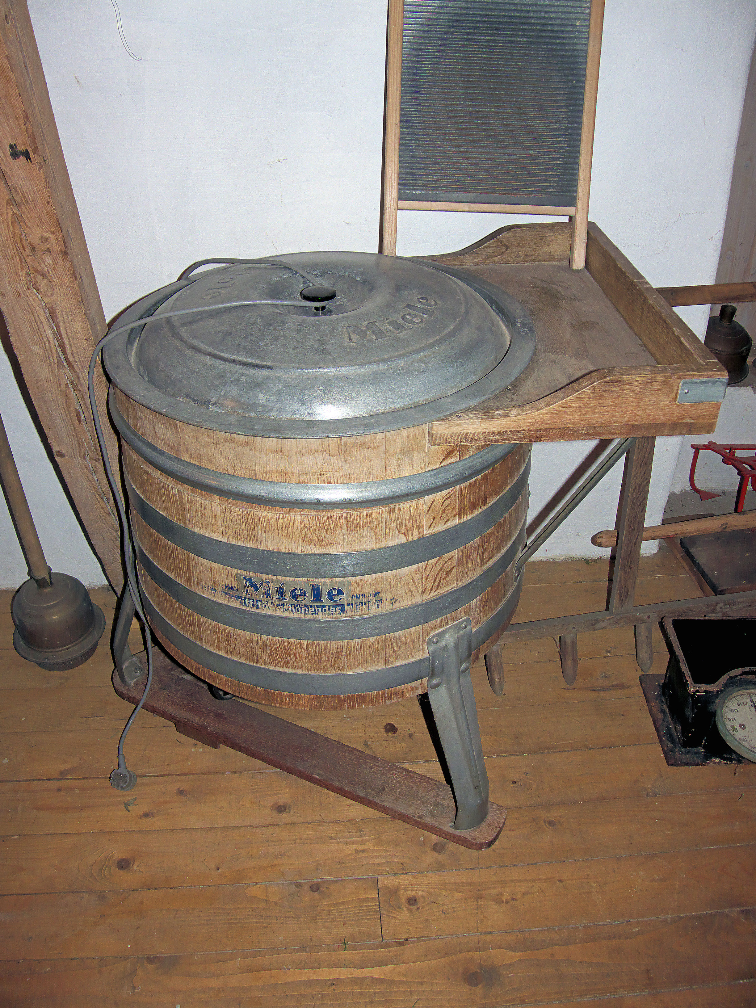 Wasmachine Miele oud model